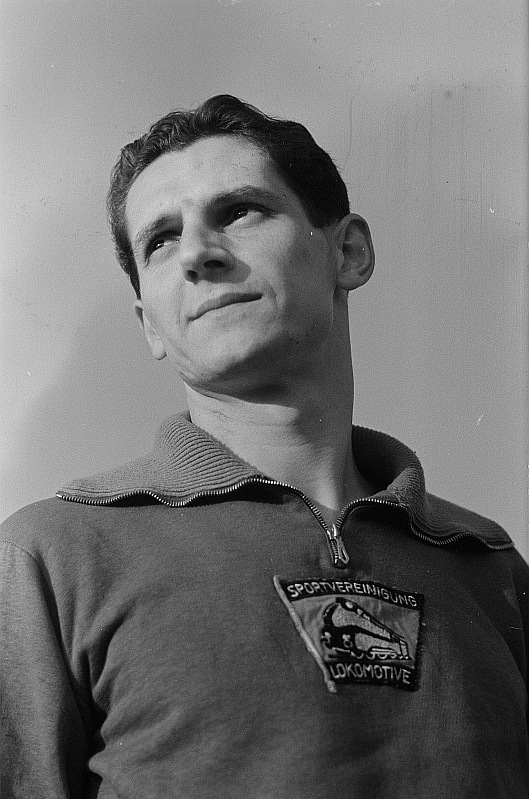 Original image description from the Deutsche Fotothek Portrait eines Handballspielers? in einem Trainingsanzug einer Sportvereinigung Lokomotive aus der Untersicht